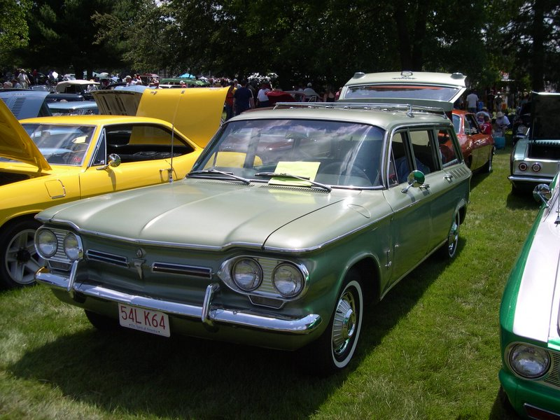 1962 Chevrolet Corvair Lakewood wagon